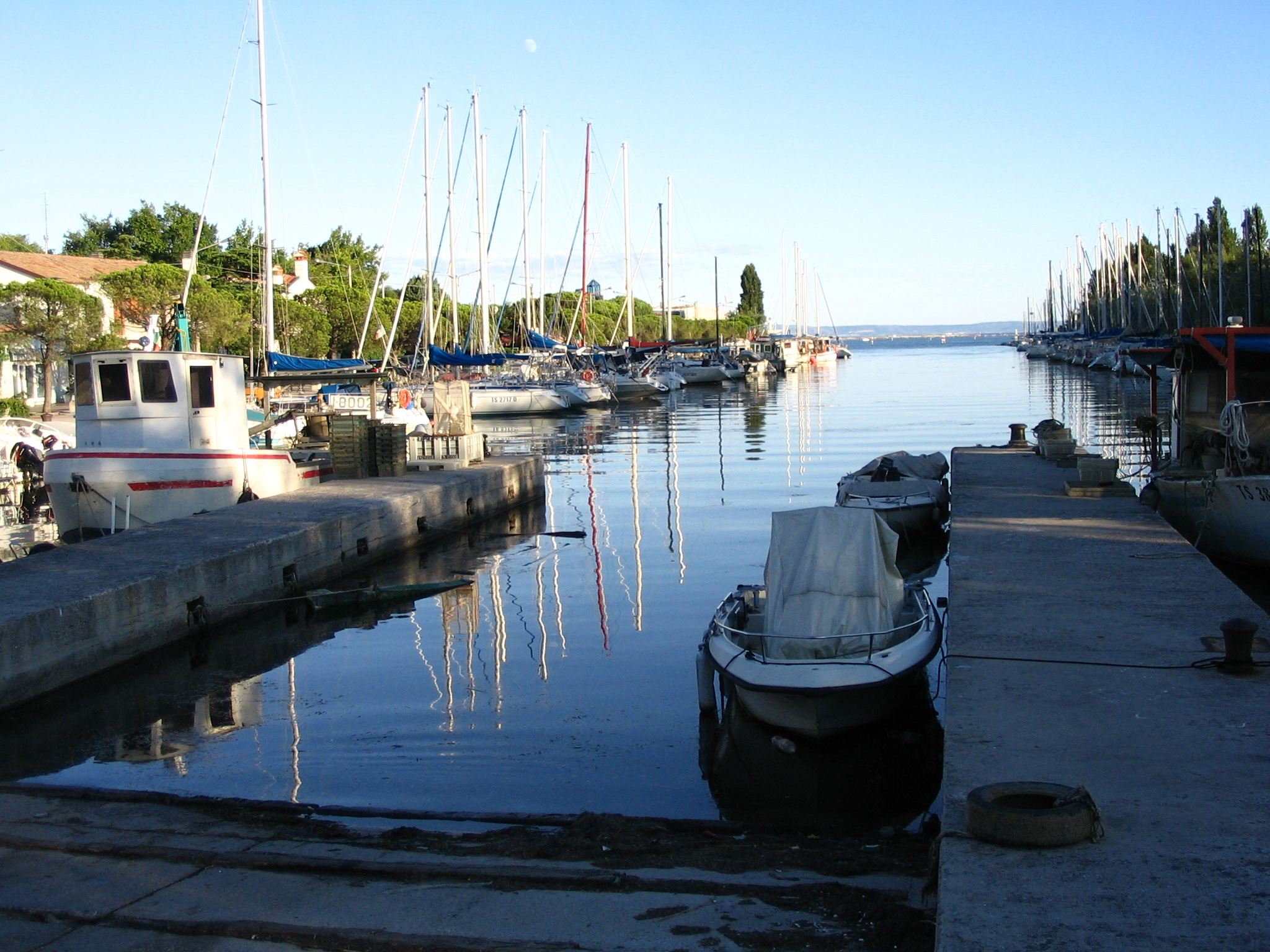 Veduta del porto-canale del Villaggio